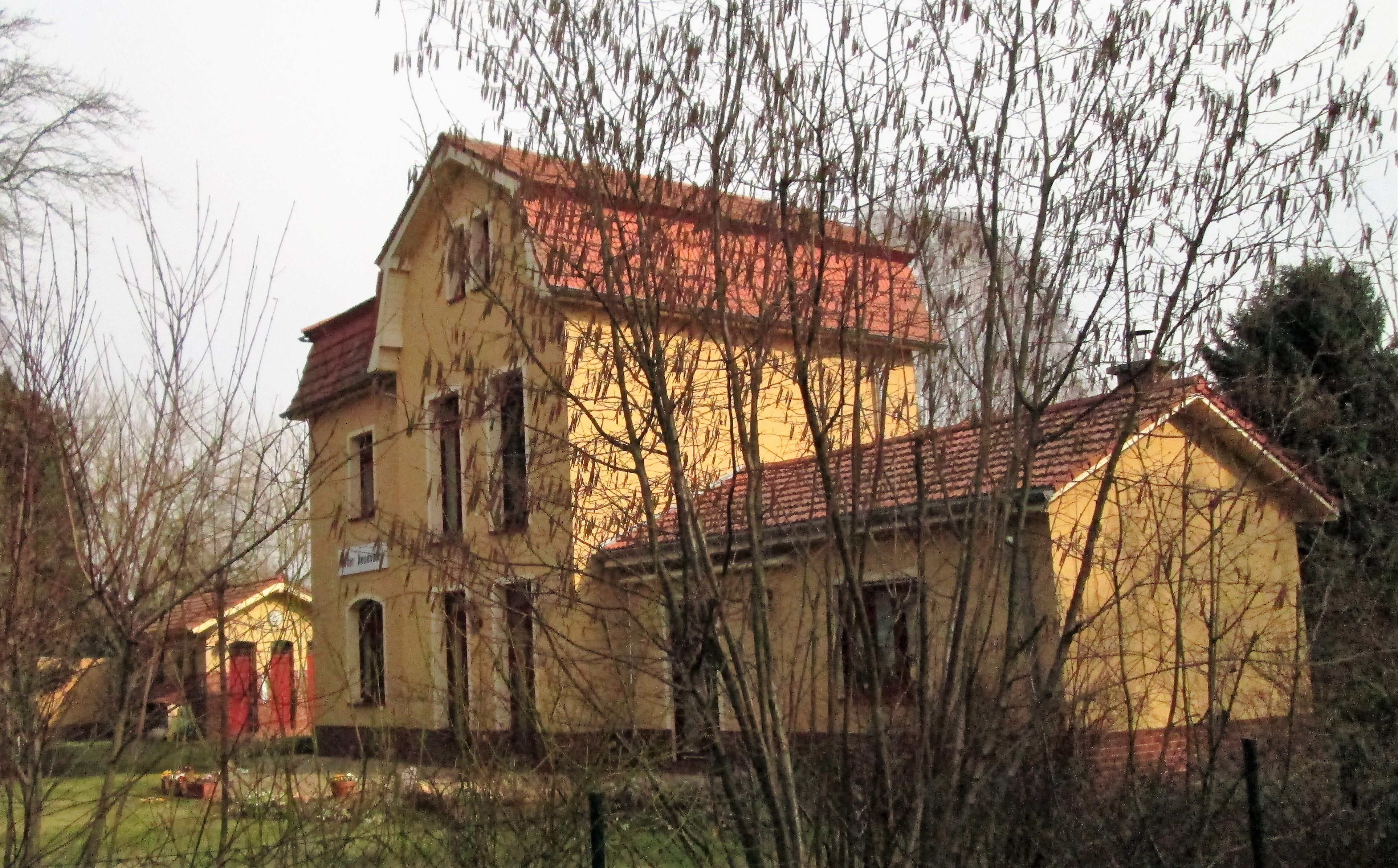 Ehemaliger Bahnhof an der Bahnstrecke Bötzow–Berlin-Spandau (Bötzowbahn)